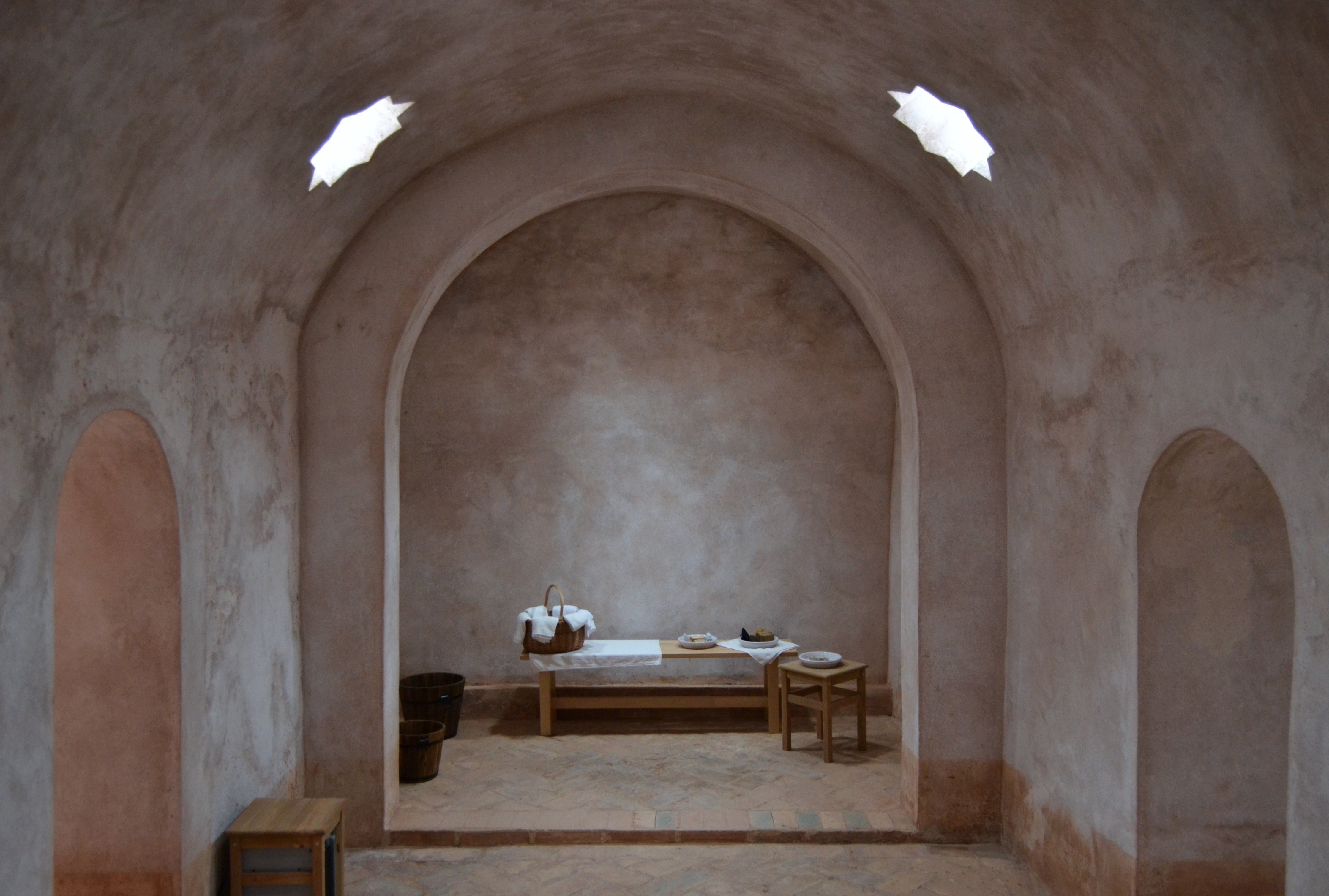 Sala tèbia dels banys àrabs de Torres Torres.